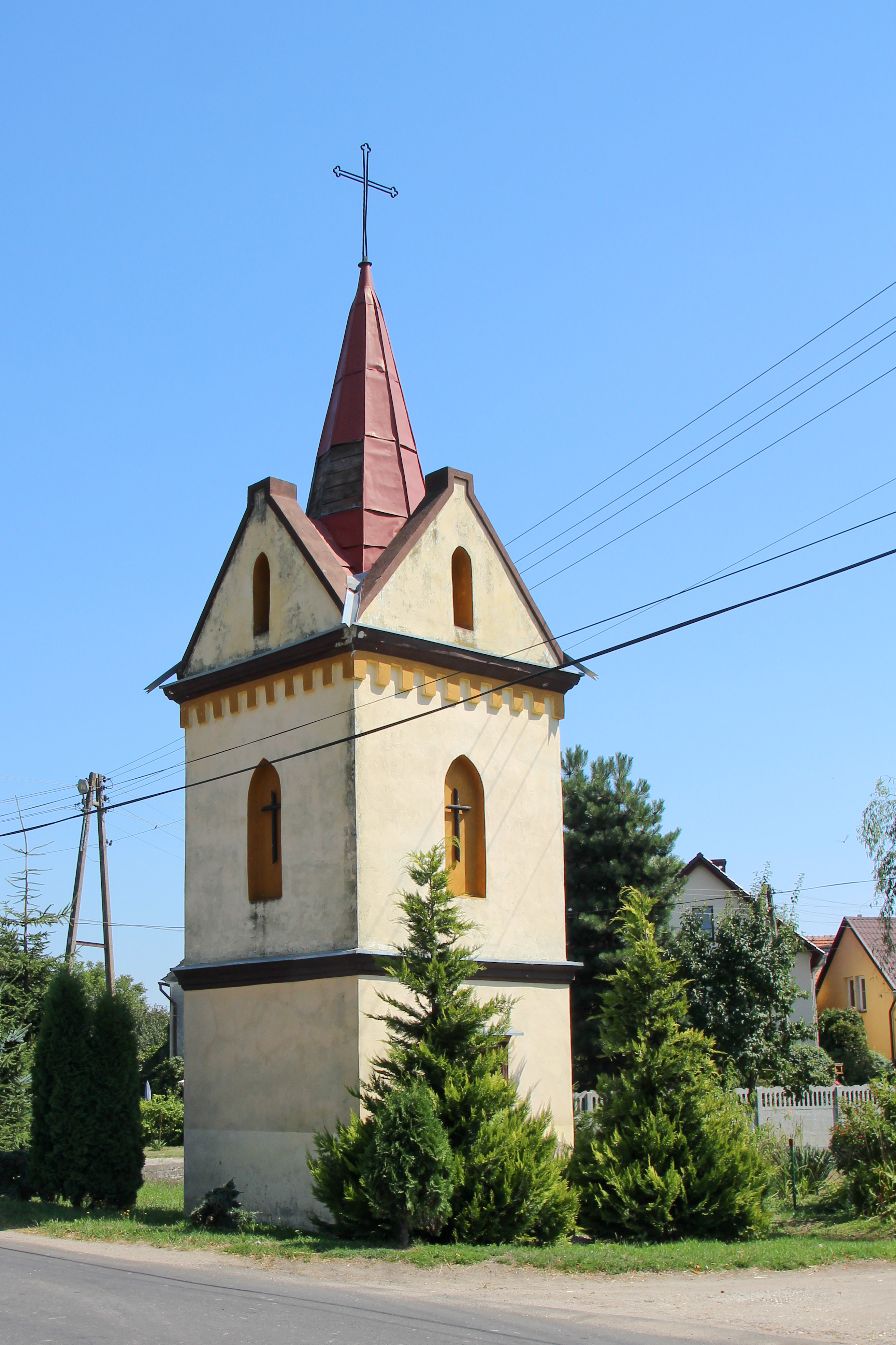 Rączka – wieś w Polsce położona w województwie opolskim, w powiecie nyskim, w gminie Korfantów.